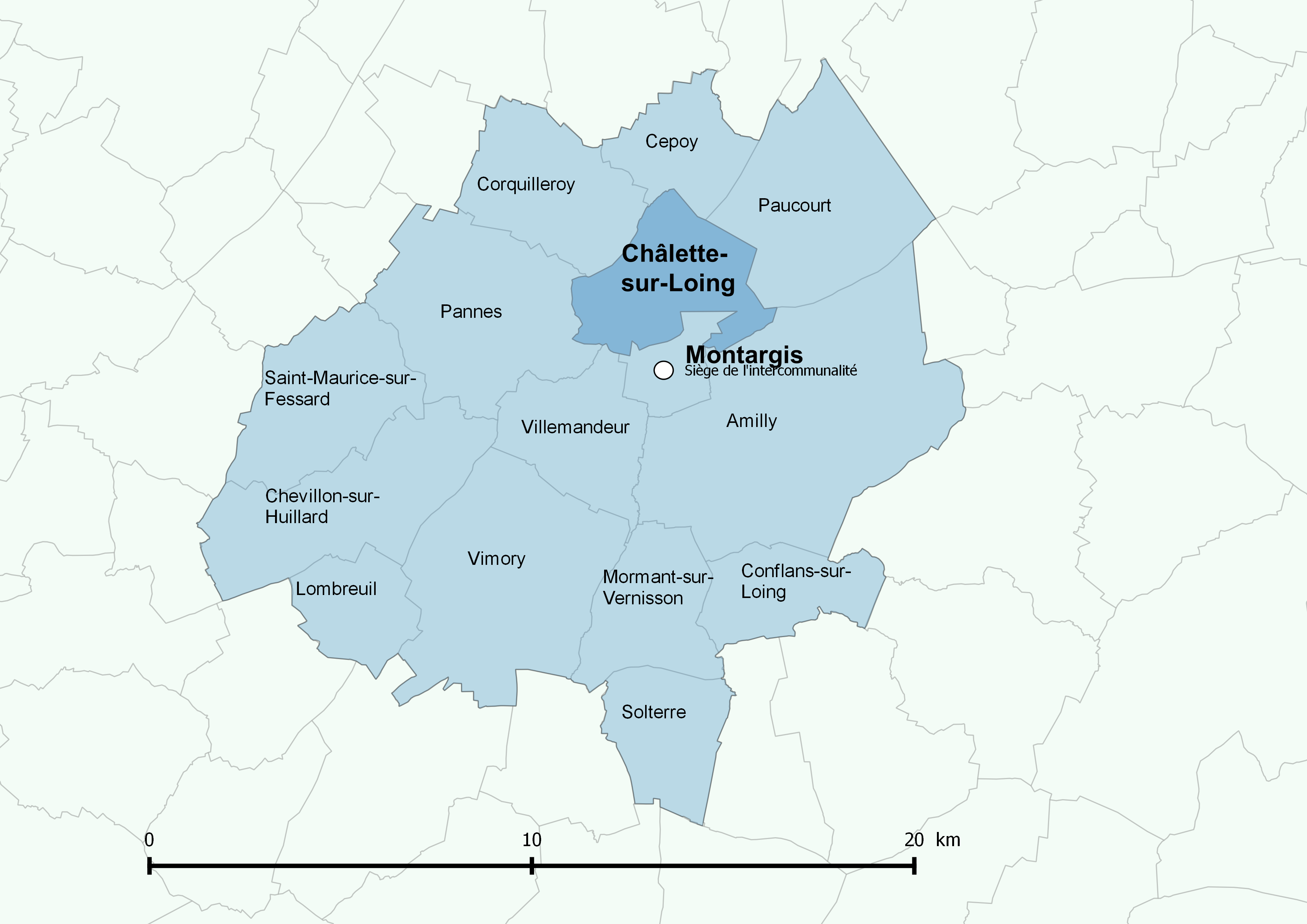 Périmètre de l'Agglomération montargoise et rives du Loing - Positionnement de la commune de Châlette-sur-Loing